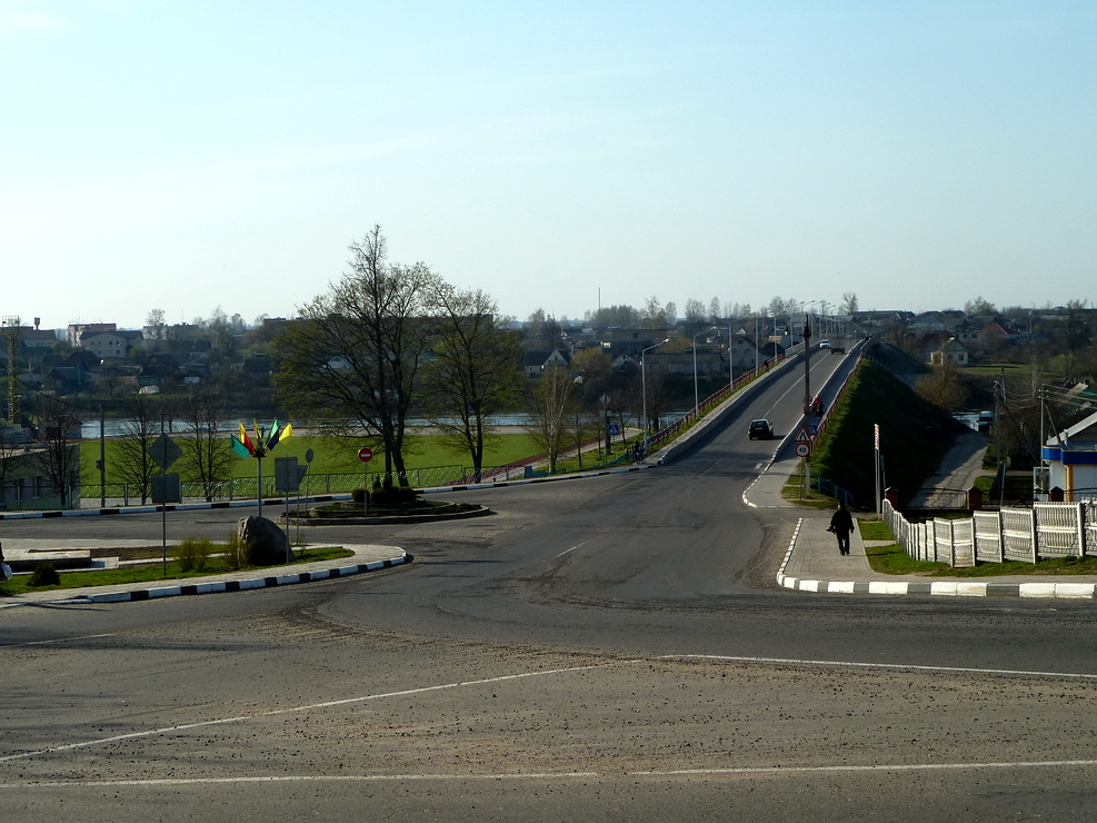 Автомобильный мост